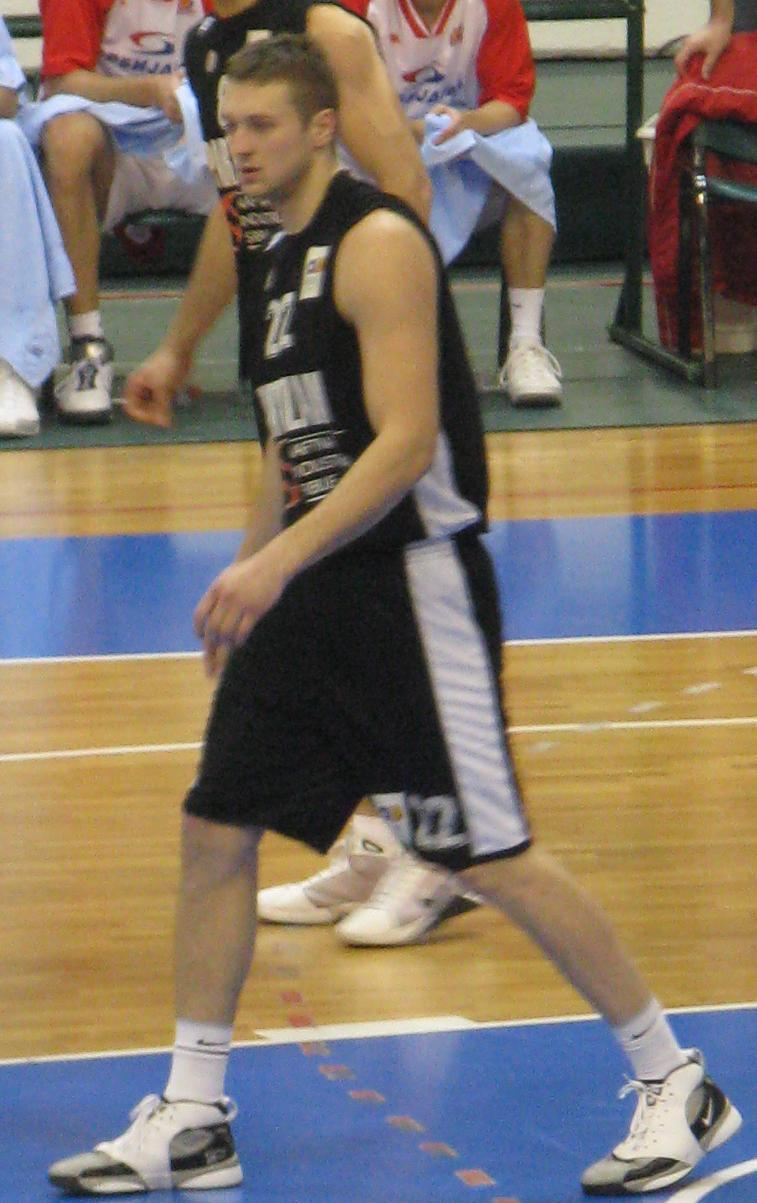 Žarko Rakočević with KK Partizan in 2009.